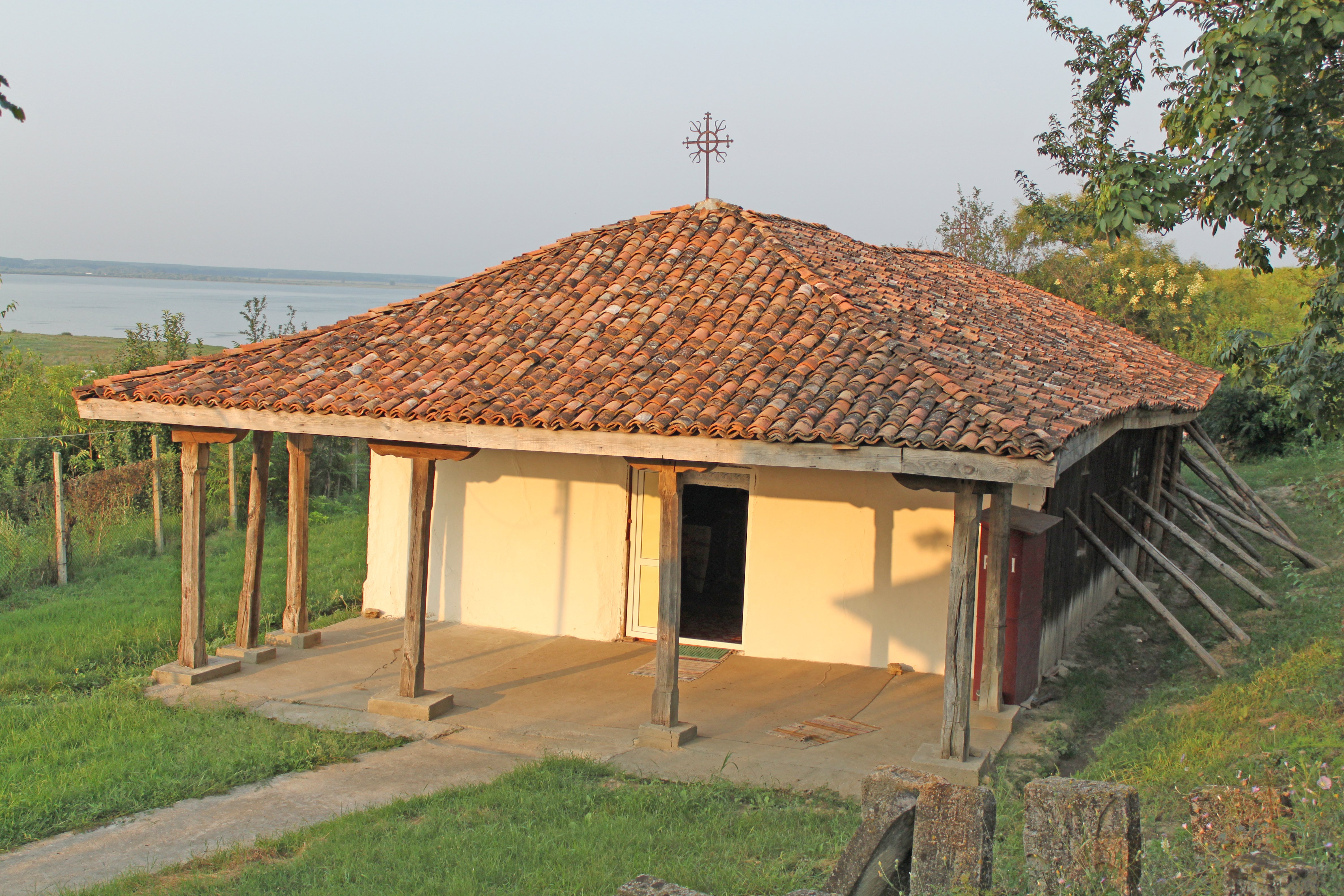 Biserica de lemn din Satu Nou, judeţul Constanţa.